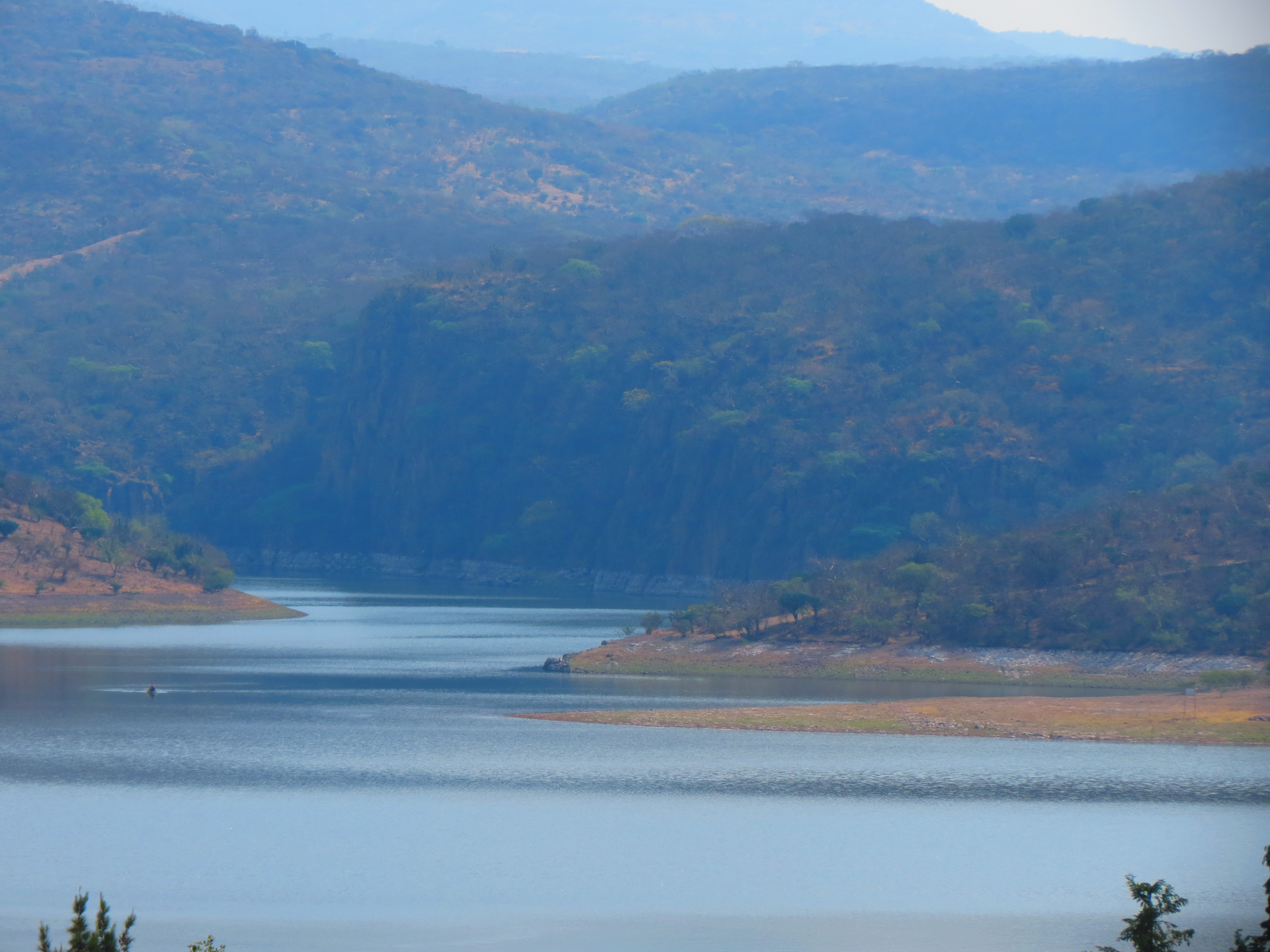 Paisaje de Malpaso, Calvillo, Aguascalientes